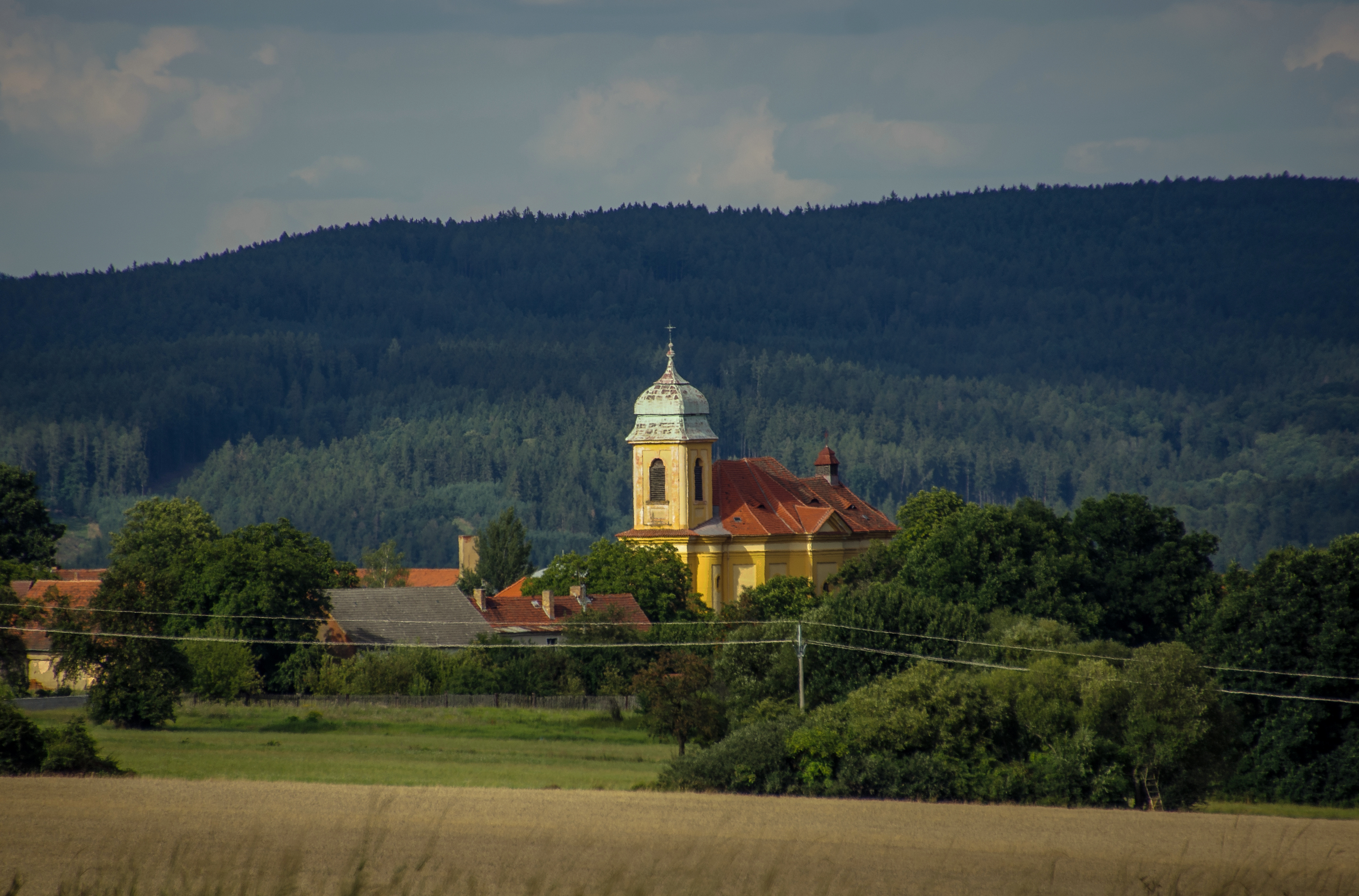 Pohled na kostel sv. Martina ze západu